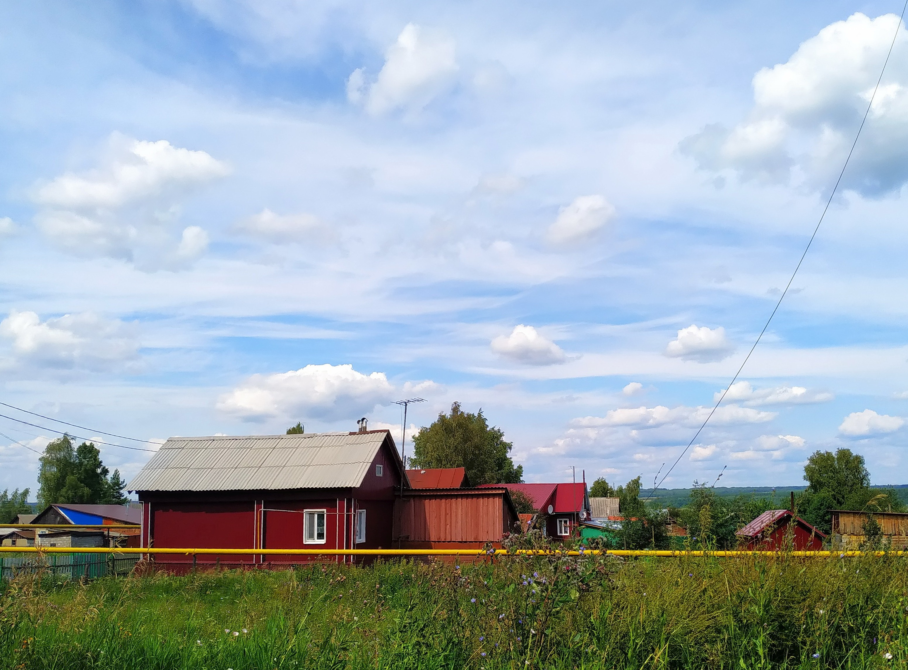 Улица Ленина, село Ахматово, Чувашия, Россия